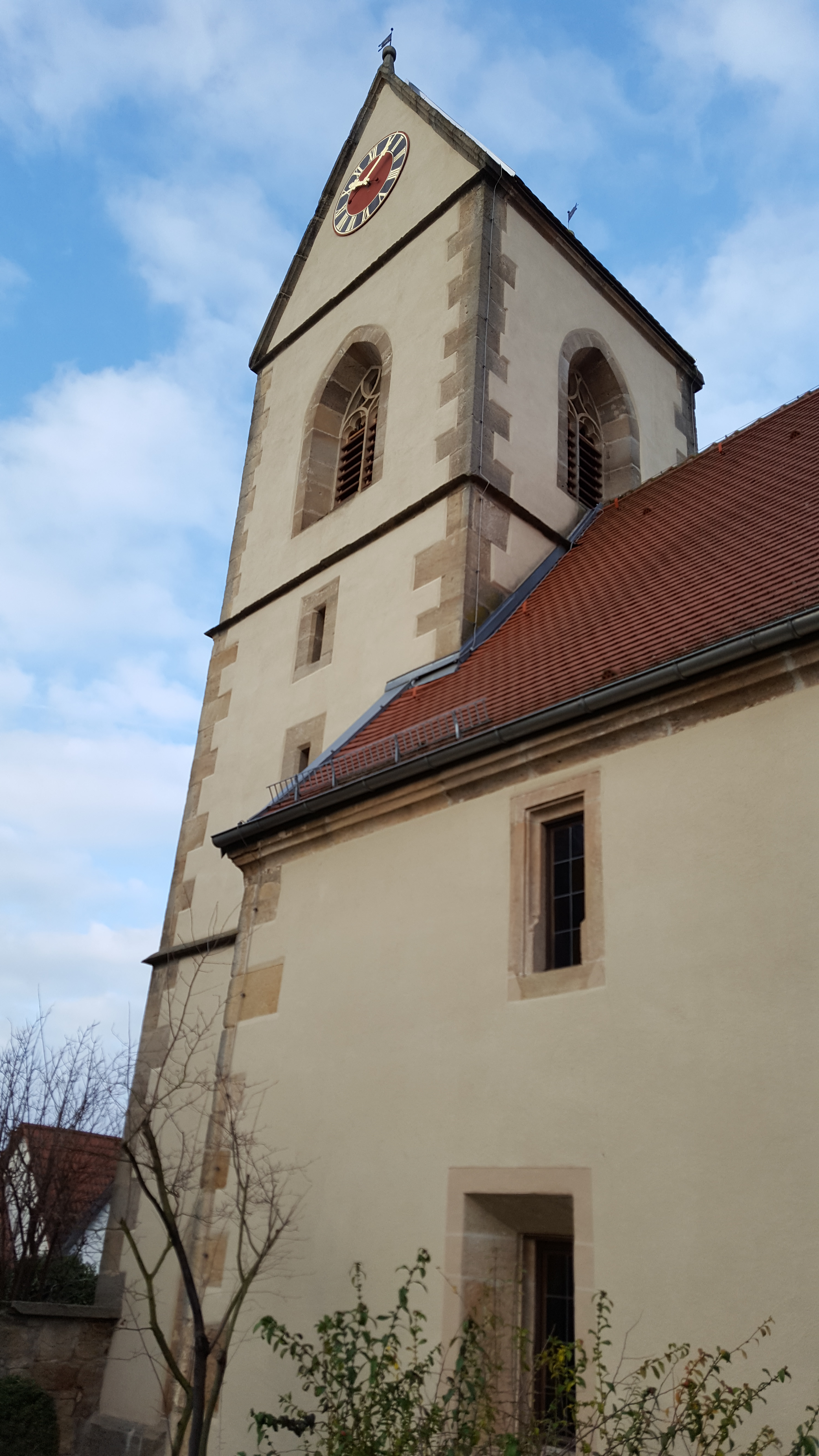 Kirchturm Sankt Wendelin (Schlaitdorf), Deutschland